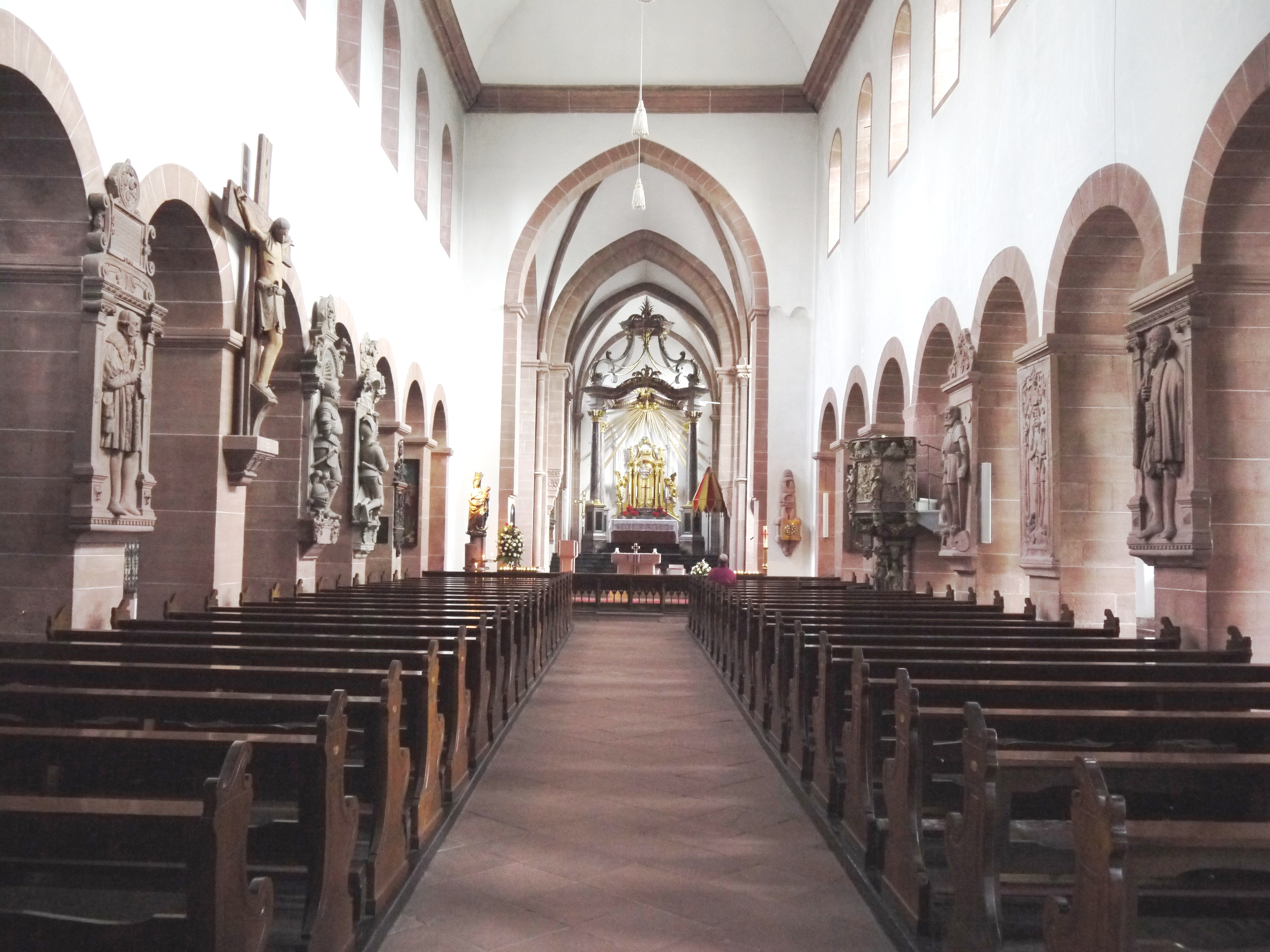 Langschiff der Stiftskirche St. Peter und Alexander in Aschaffenburg